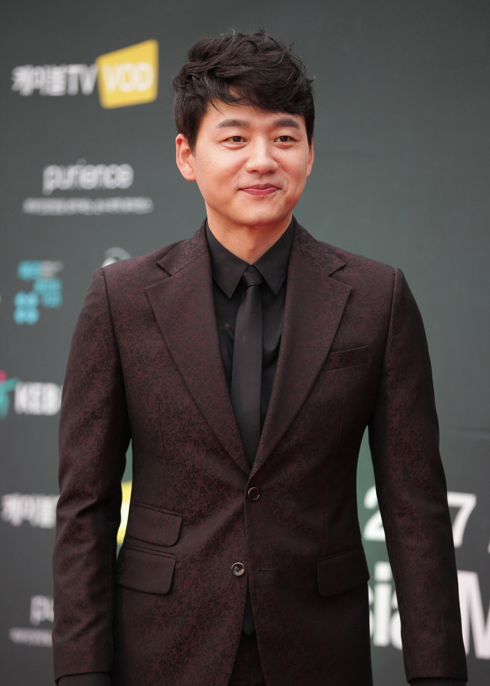 2017 아시아 모델 페스티벌 레드카펫